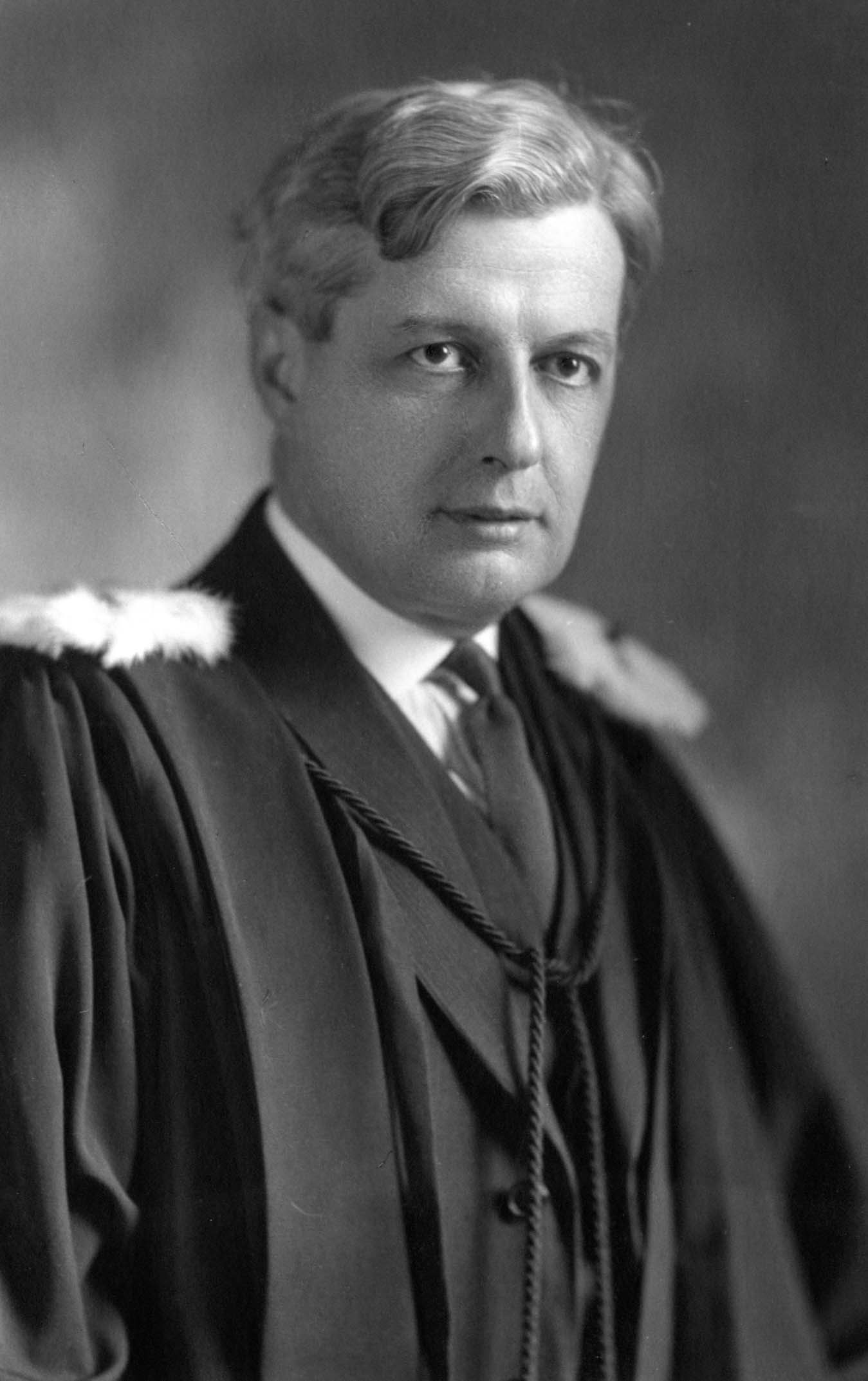 Portrait de Monsieur Édouard Montpetit, professeur à l'école des hautes études commerciales.